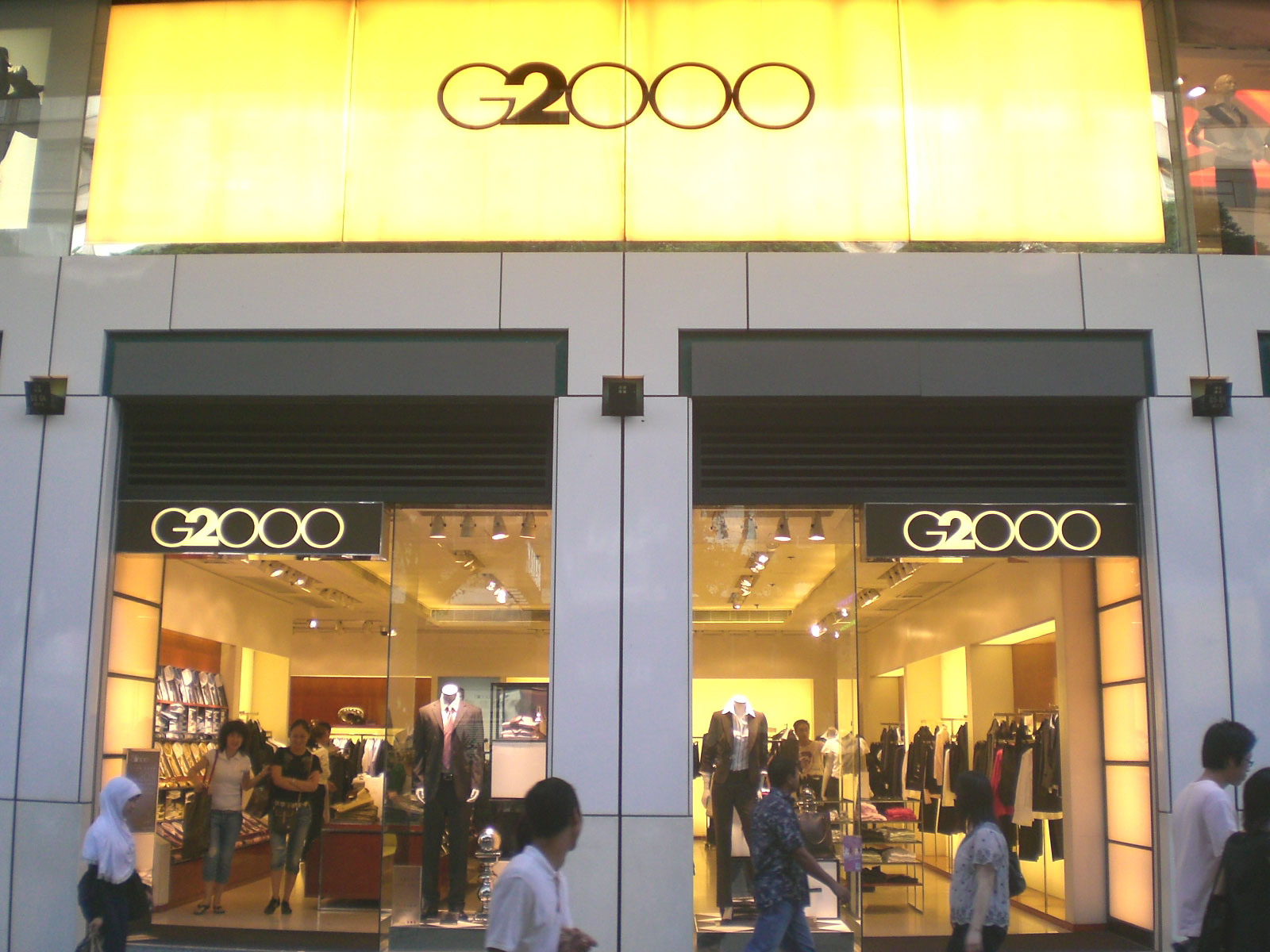 尖沙咀彌敦道柏麗購物大道G2000 縱橫二千集團